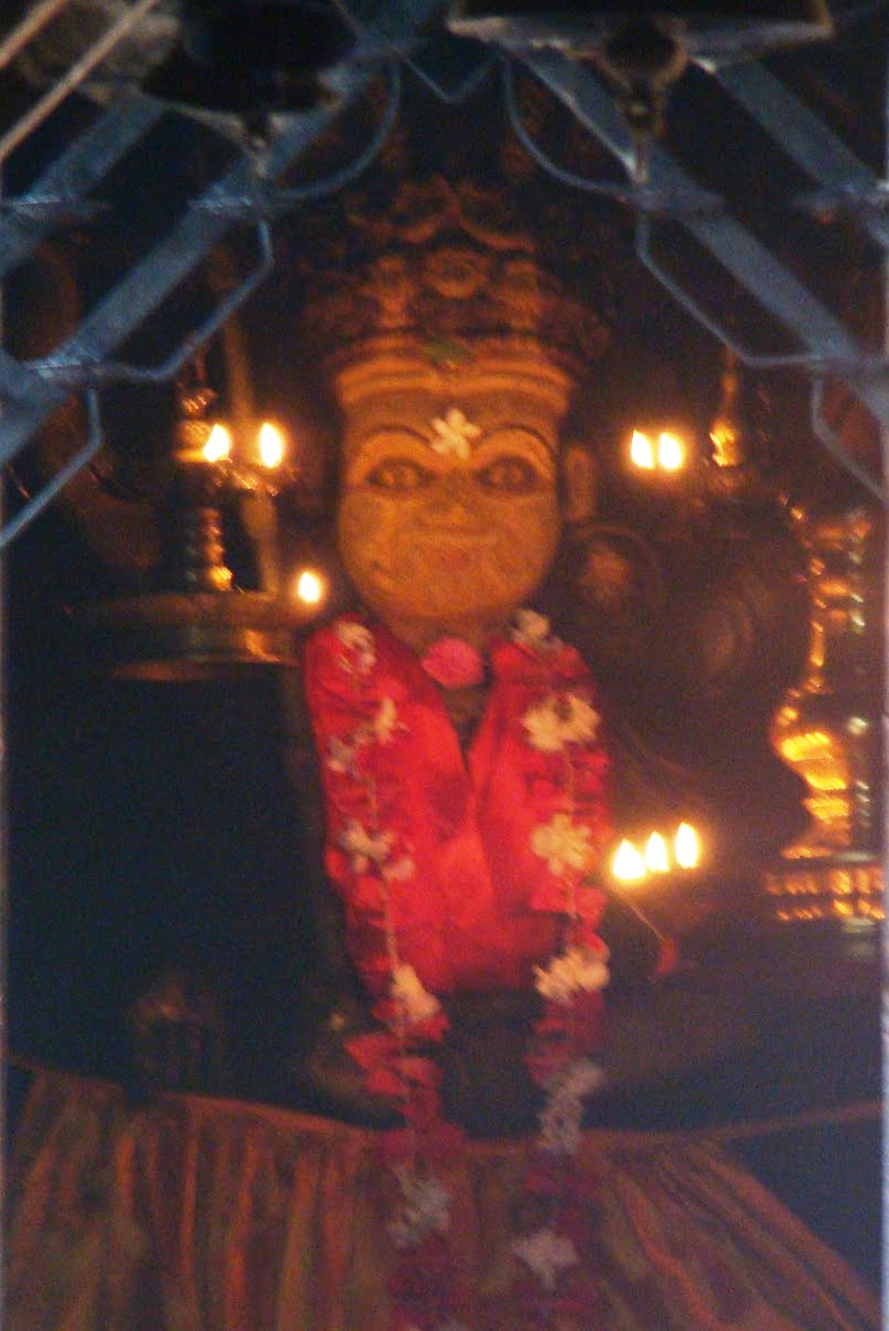 മോർക്കുളങ്ങര ഭഗവതി